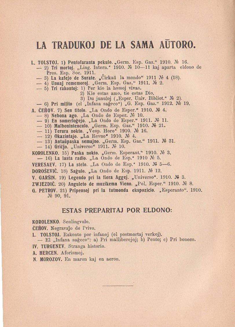 Listo de tradukoj de Maria Ŝidlovskaja en Princo Serebrjanij